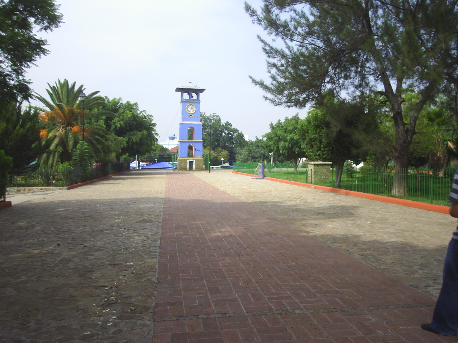 Zaachila